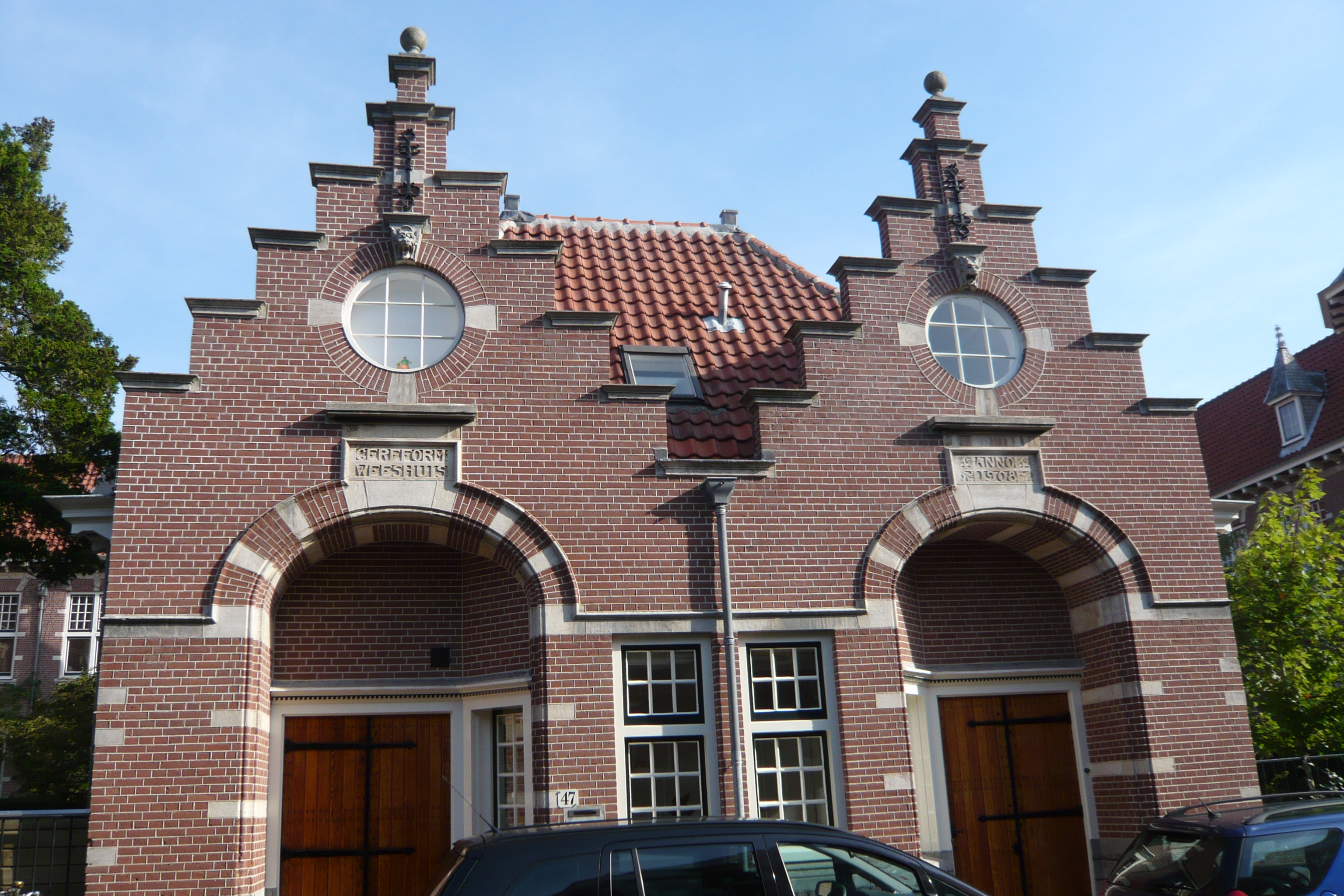 Gereformeerd Weeshof Coen Cuserhof, Olieslagerslaan, Haarlem. Architect J.A.G. van der Steur (1865-1945)